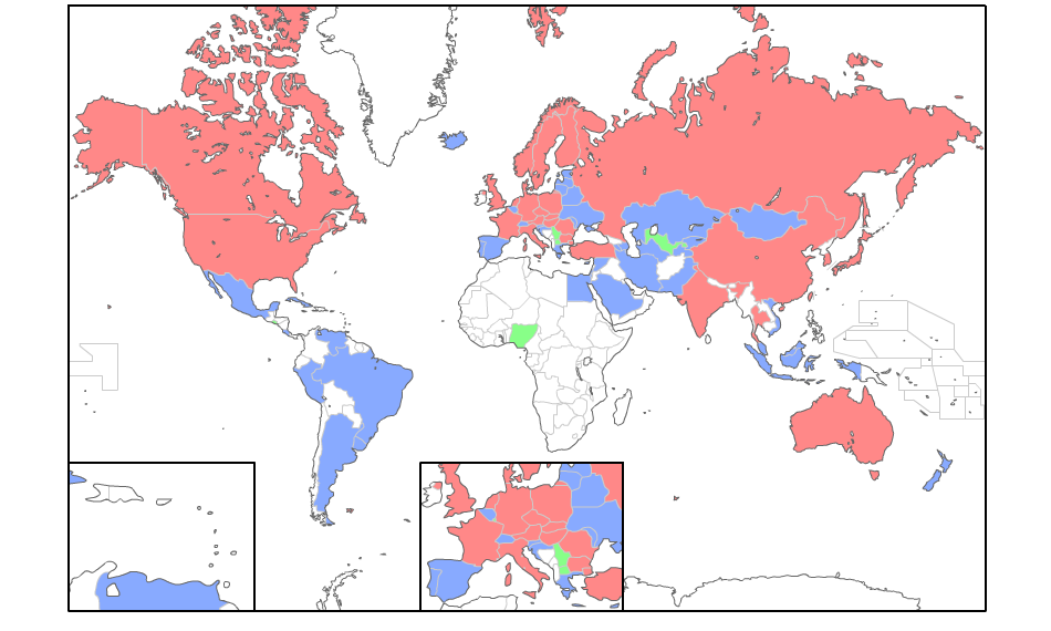 Participant contries of IChO during 2011